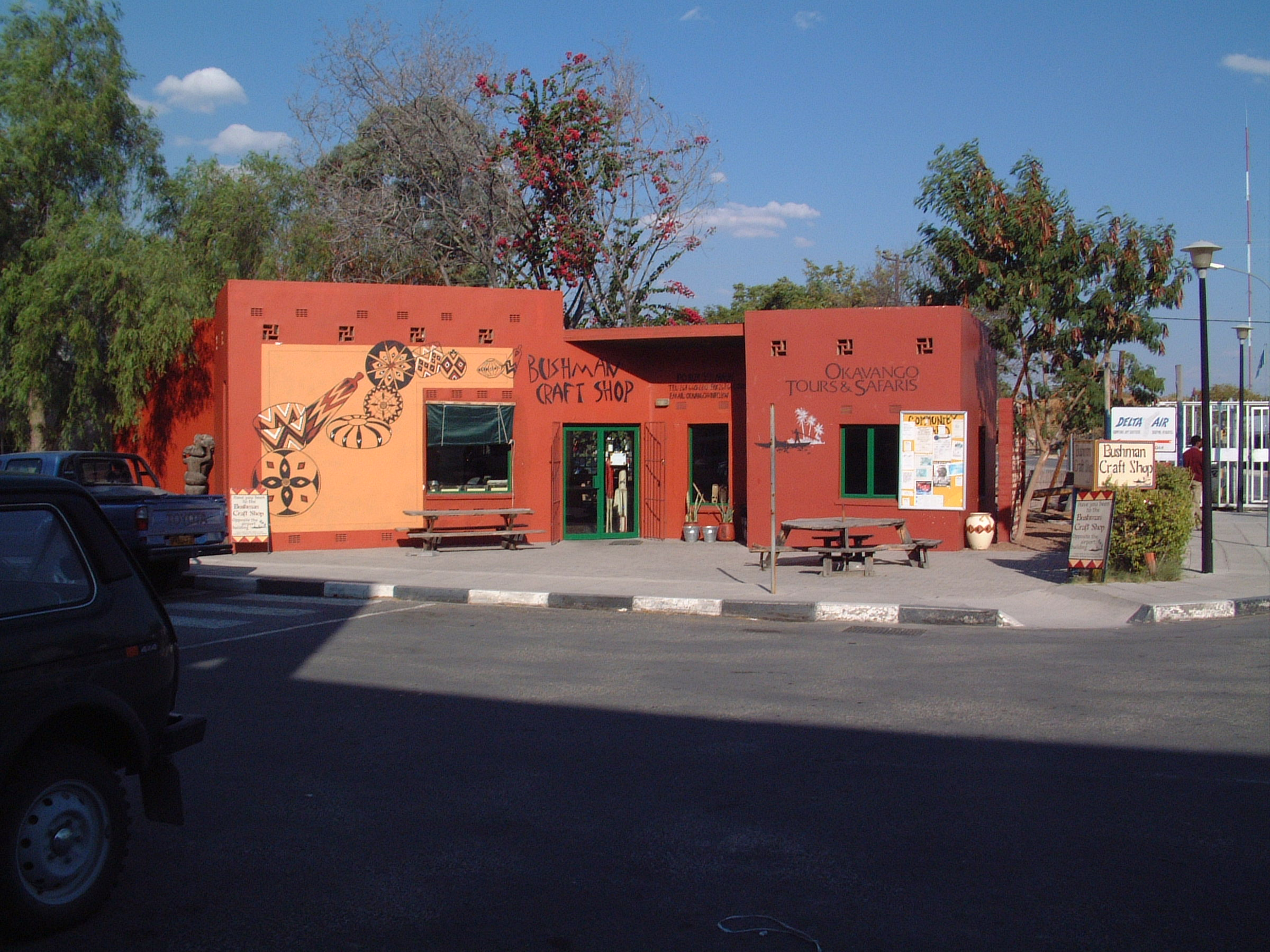 Flugplatz Maun.